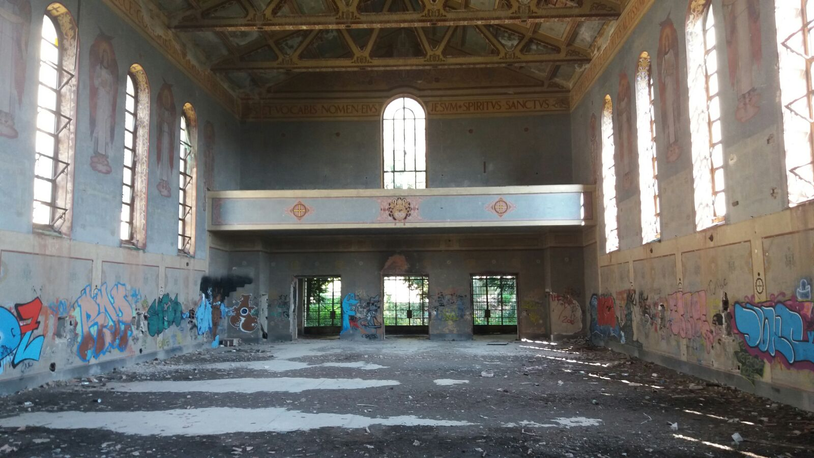 Interno della Chiesa Sconsacrata dell'Ex-Seminario Regionale di via Pio XI di Salerno.